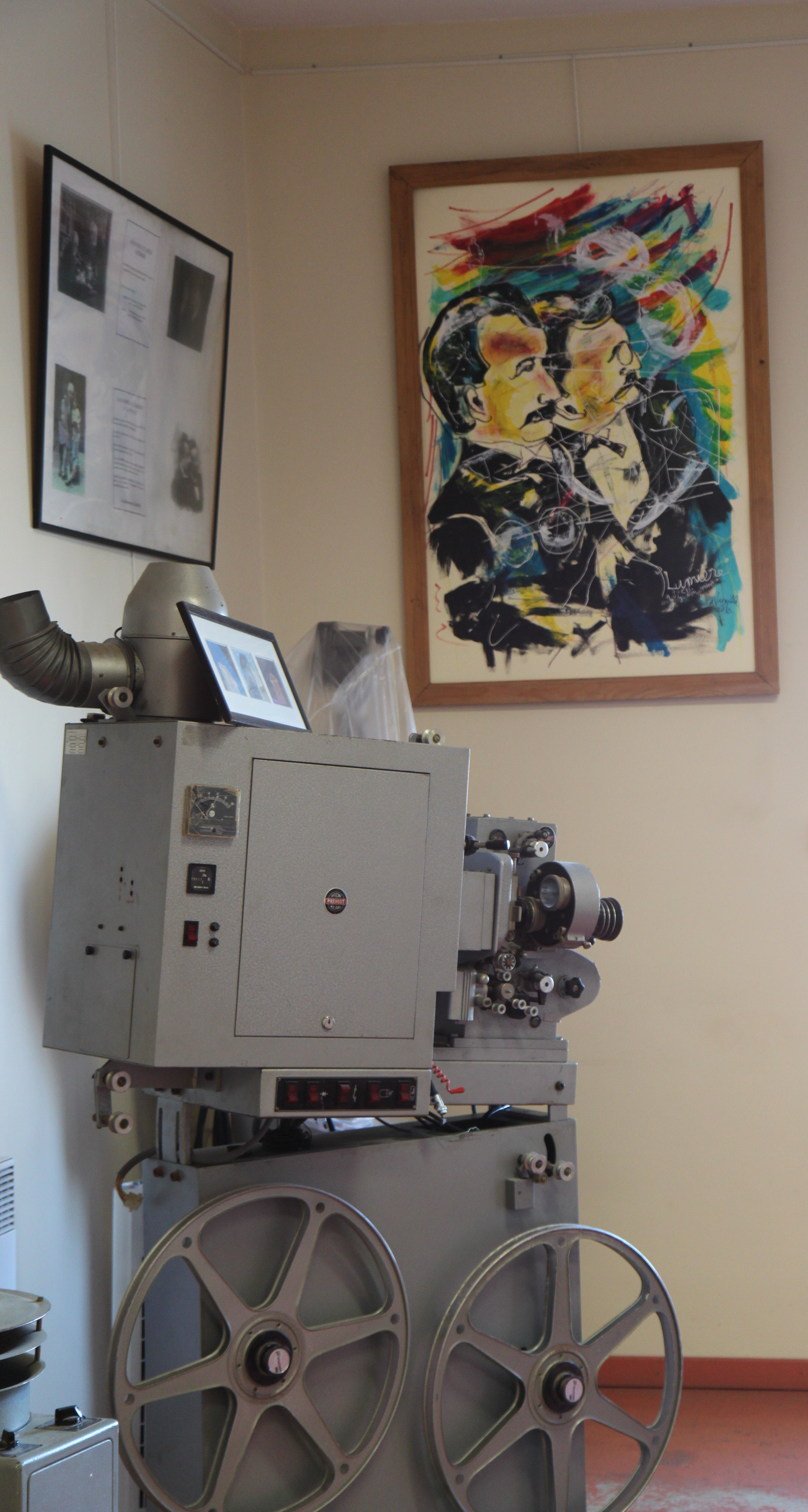 Frères Lumière